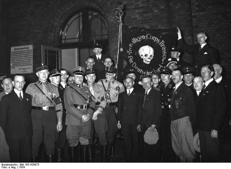 Berlin, Fahne Freikorps Brüssow Scherl Bilderdienst: Überführung der Freikorpsfahne Brüssow nach München, 1934. Ein Ehrensturm der Standarte 18 geleitet den Freikorpsführer Brüssow und den Fahnenträger (jetziger SA-Sturmführer) Kiki mit der Freikorpsfahne zum Anhalter Bahnhof [in Berlin], von wo aus die Fahne nach München gebracht wird. Alle irgendwie abkömmlichen Kämpfer des Freikorps Brüssow hatten sich auf dem Anhalter Bahnhof zum Abschiednehmen unter der Fahne noch einmal versammelt. Freikorpsführer Brüssow (l.[in Stahlhelmuniform]), Fahnenträger SA-Sturmführer Kiki [neben der Fahne]. 15615-34 Abgebildete Personen: Brüssow, Hans: Führer des Freikorps Brüssow, Deutschland